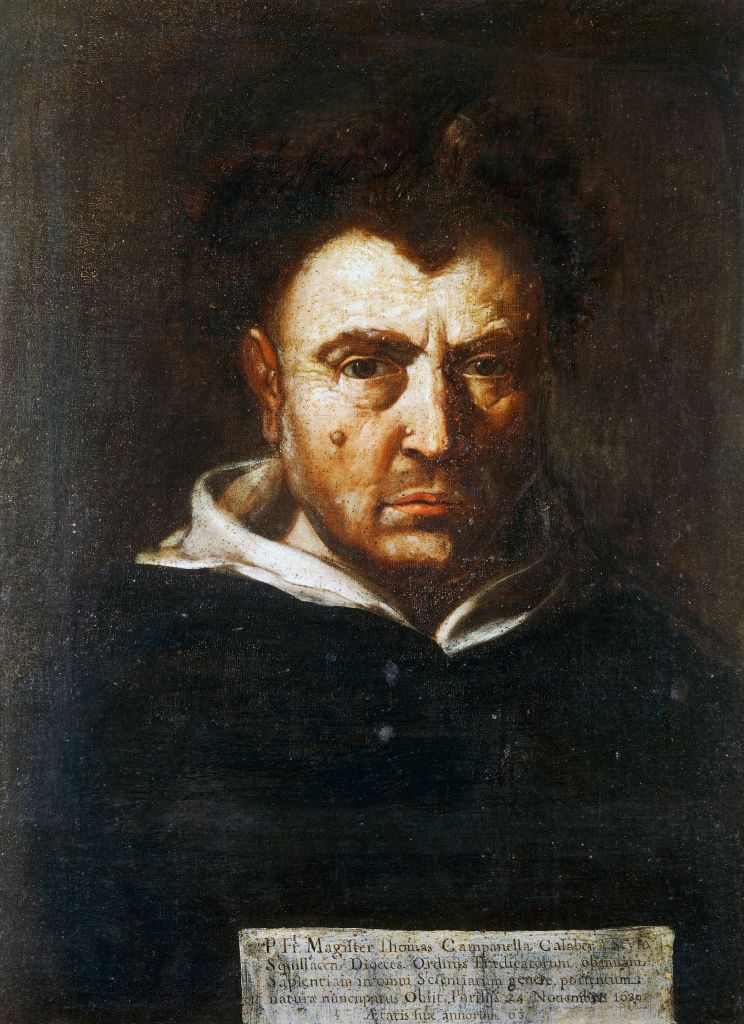 Ritratto di Tommaso Campanella, Collezione Camillo Caetani, Sermoneta, Italia